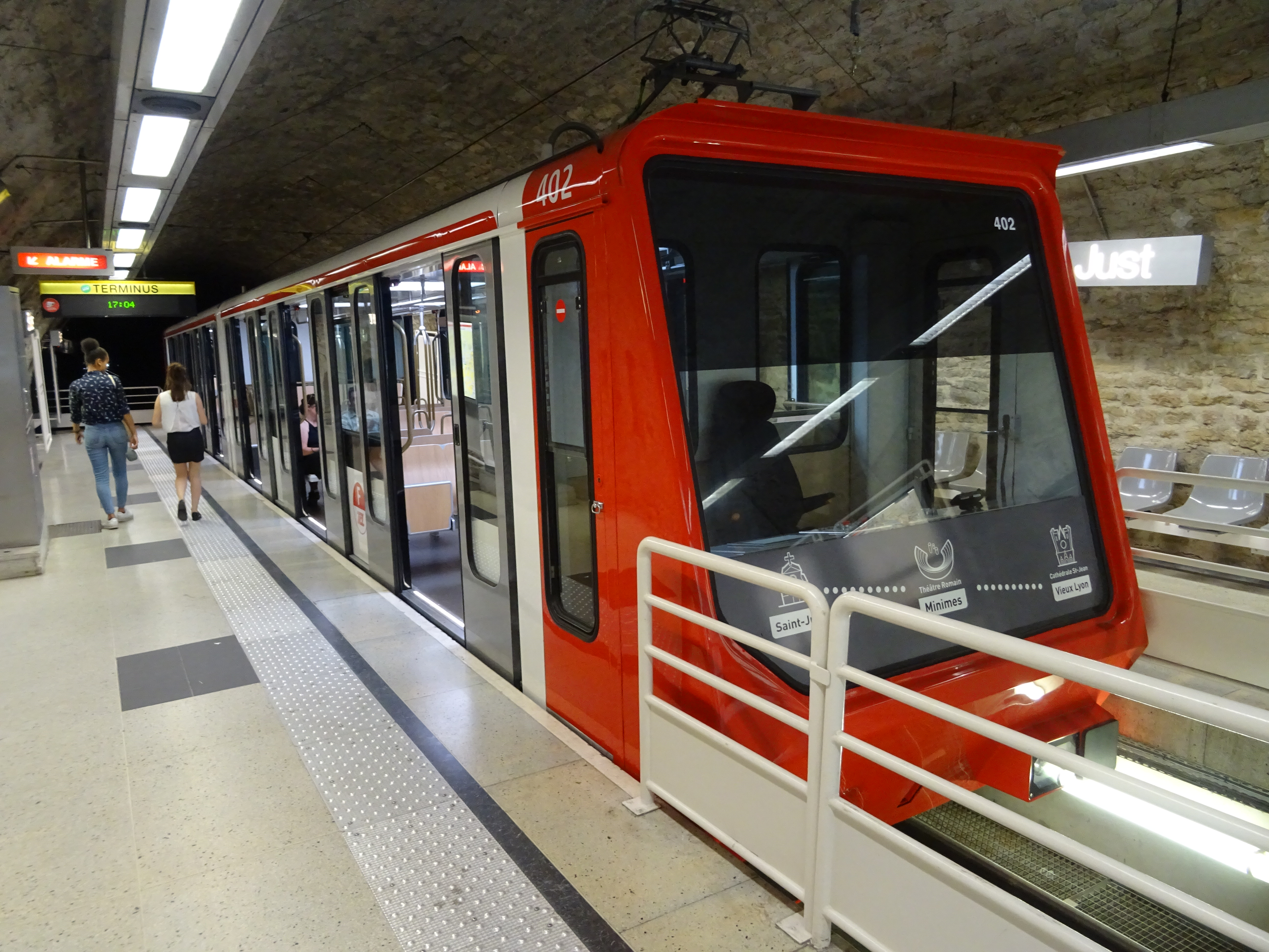 Funiculaire en station haute de Saint-Just.